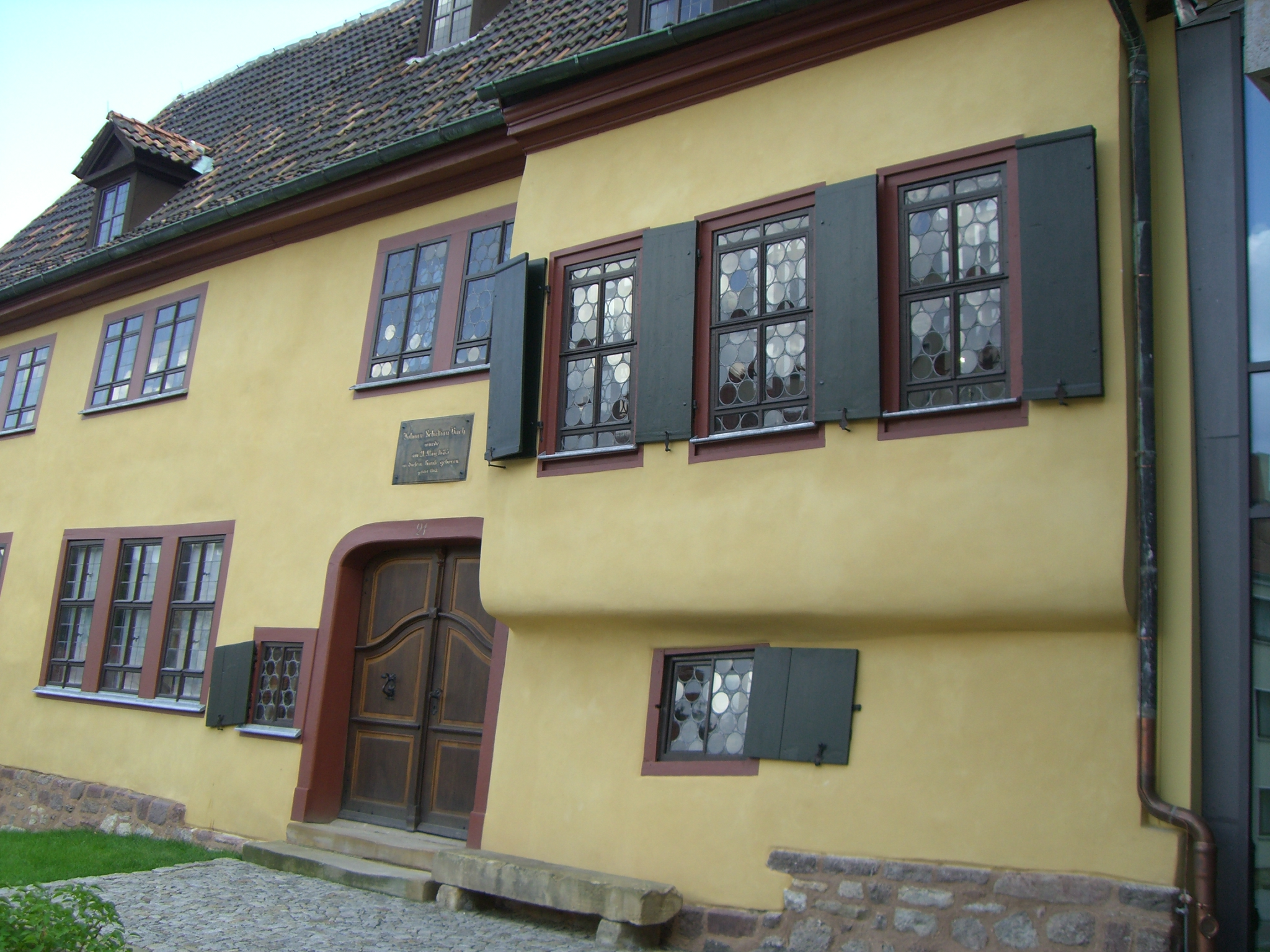 Bachhaus Eisenach.